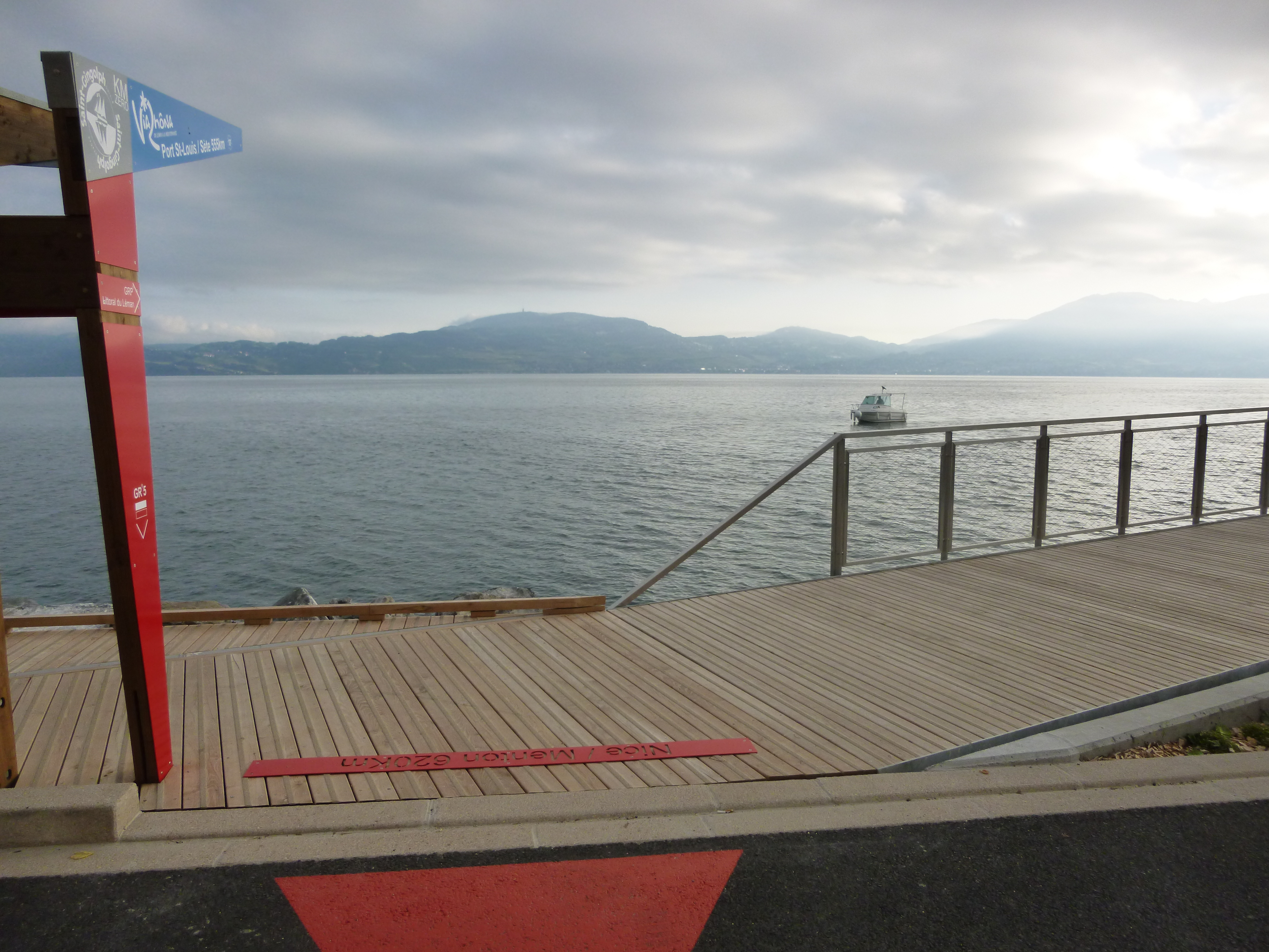 Indication de départ de la grande traversée des Alpes (GR5) à Saint-Gingolph. 620 km du lac Léman à Nice ou Menton.